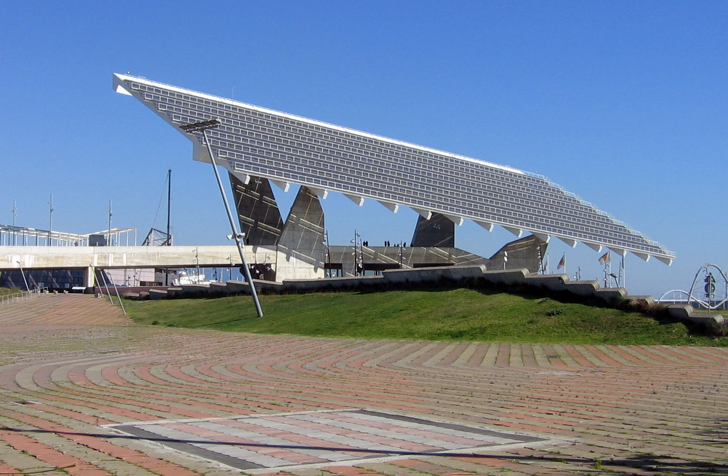 Placa fotovoltaica del Fórum.